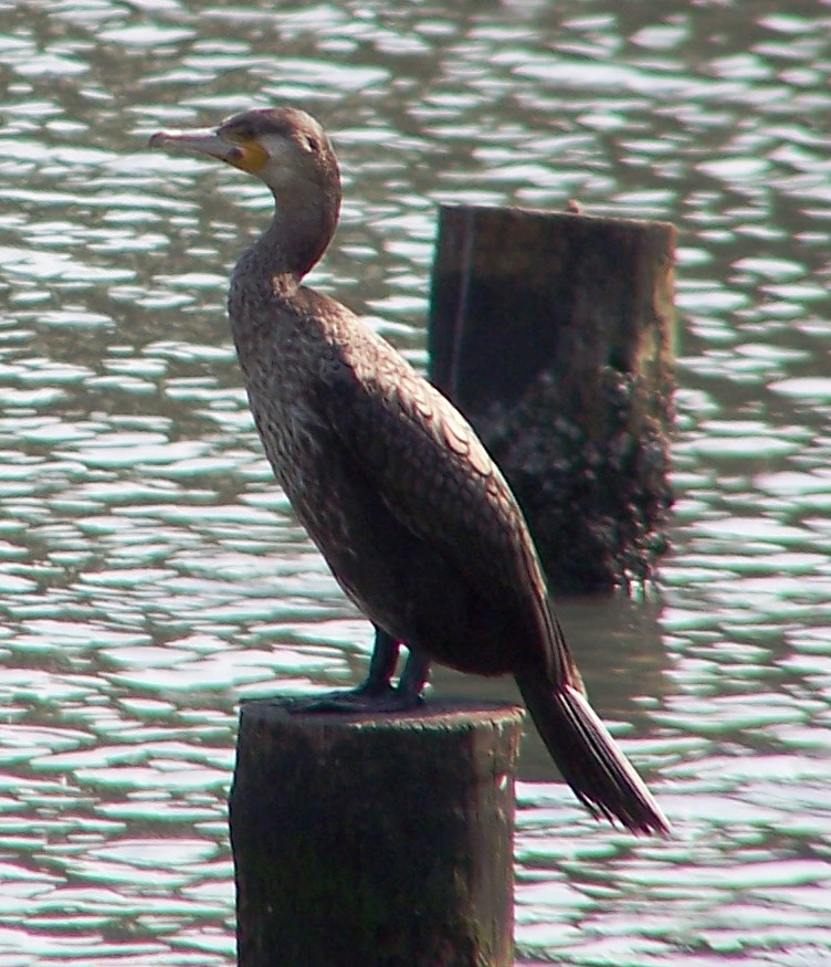 Great Cormorant Phalacrocorax carbo, juvenile.